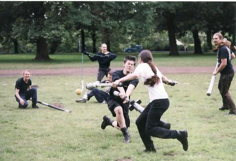 Hannover Living Undeads bei einer Partie Jugger Photograph: Alexandra Gerdsmeyer Copyright Status: GNU Freie Dokumentationslizenz